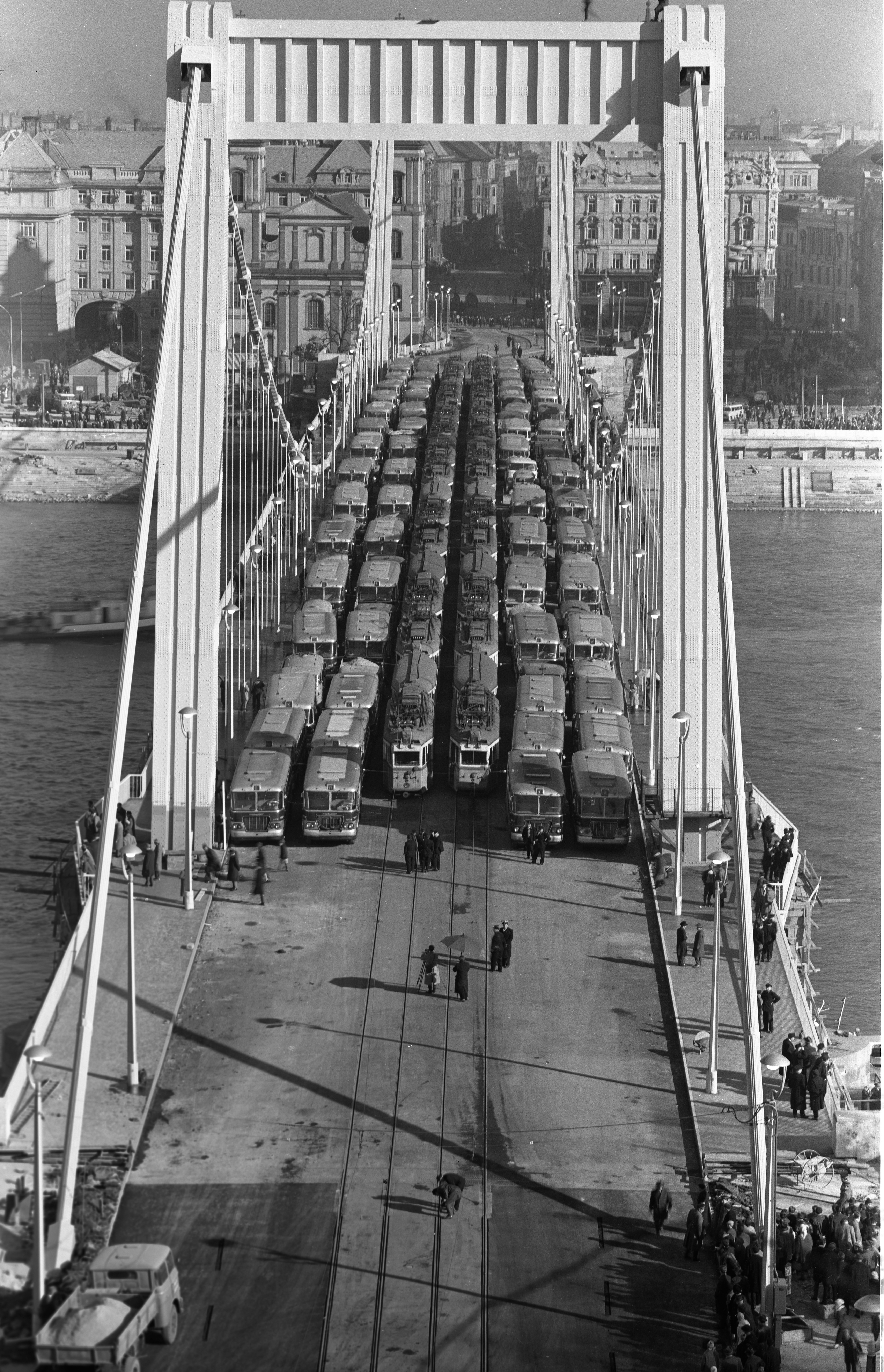 az Erzsébet híd terheléspróbája. Location: Hungary, Budapest Tags: construction, tram, bus, transport, Ikarus-brand, Ganz-brand, Ganz UV tramway, Hungarian brand, load testing Title: az Erzsébet híd terheléspróbája.